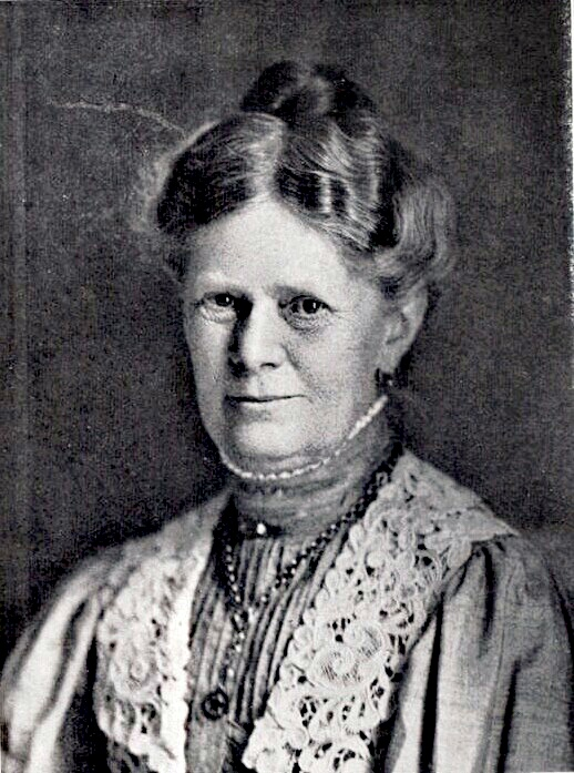 Marie Hankel, ĉ. 1908